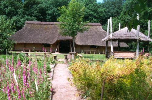 Die Sachsenhof-Anlage in Greven-Pentrup.